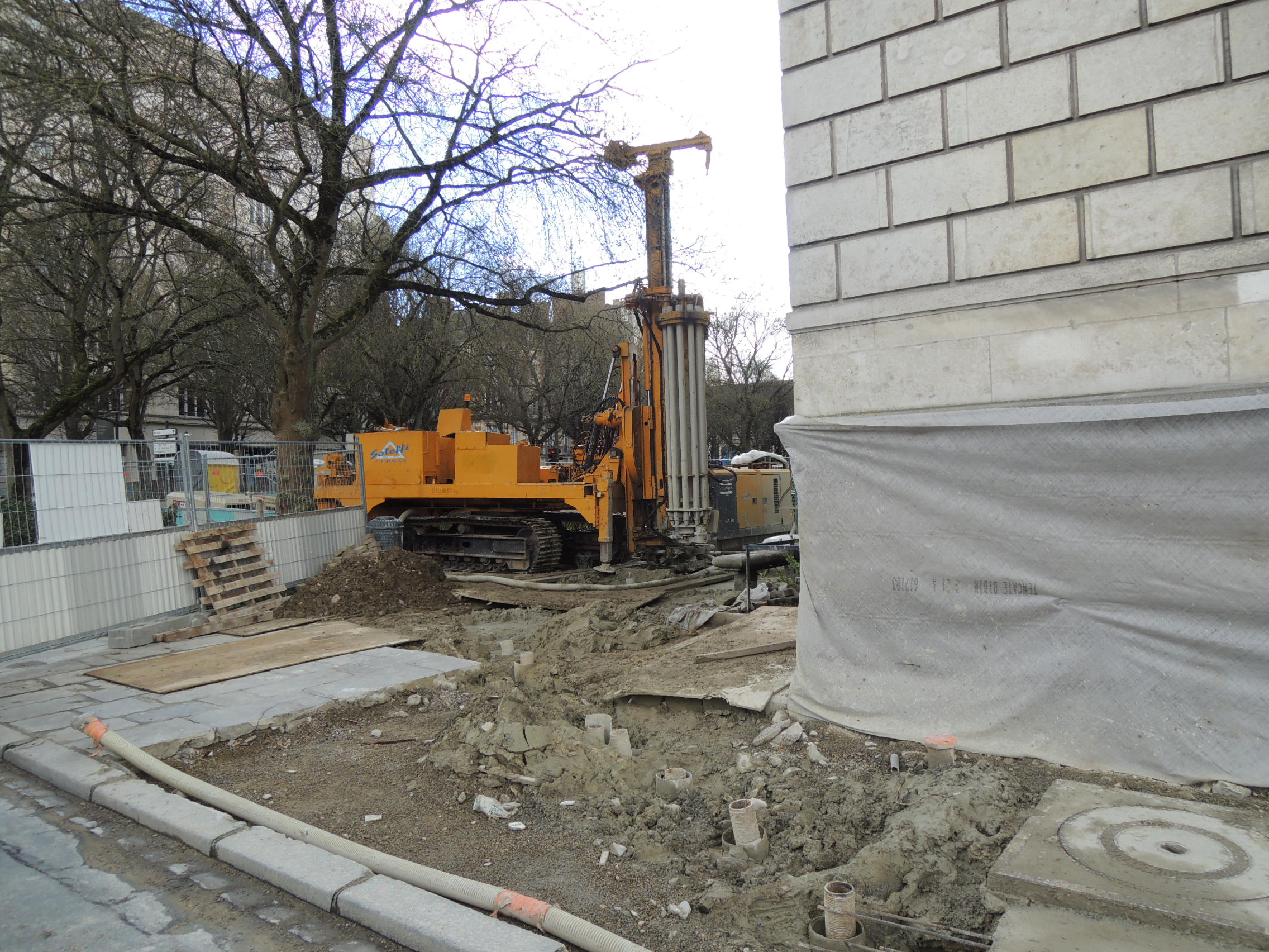 Machine d'injection de micropieux pour le renforcement des sols dans le cadre du passage du tunnelier de la ligne b à Rennes. A côté du musée des Beaux-arts de Rennes.